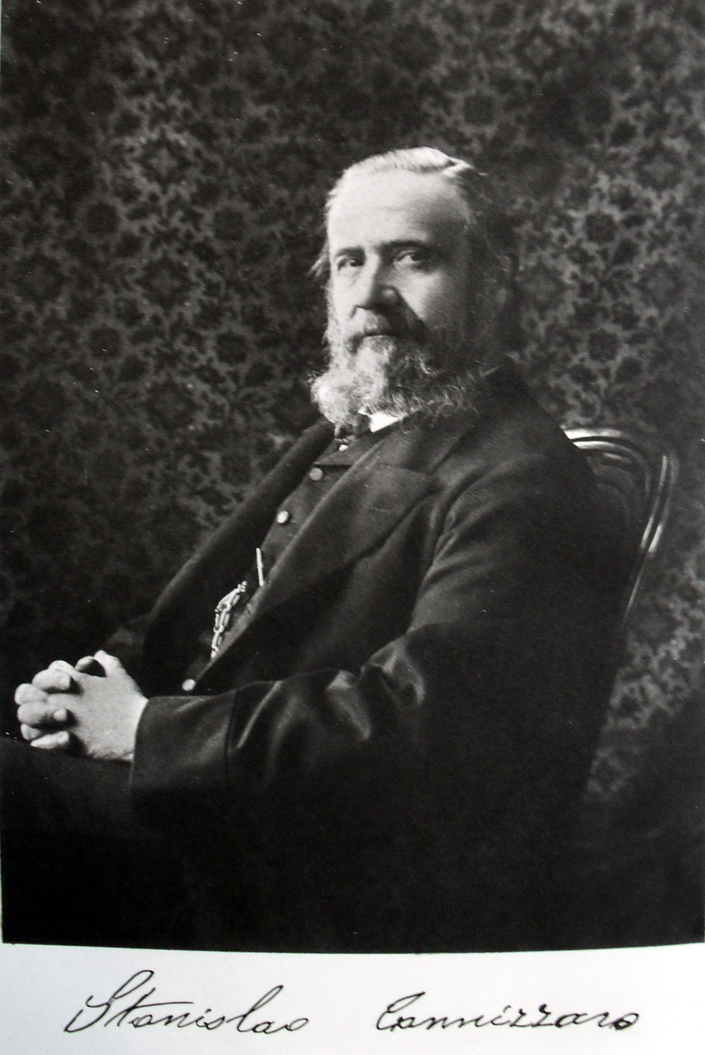 Stanislao Cannizzaro